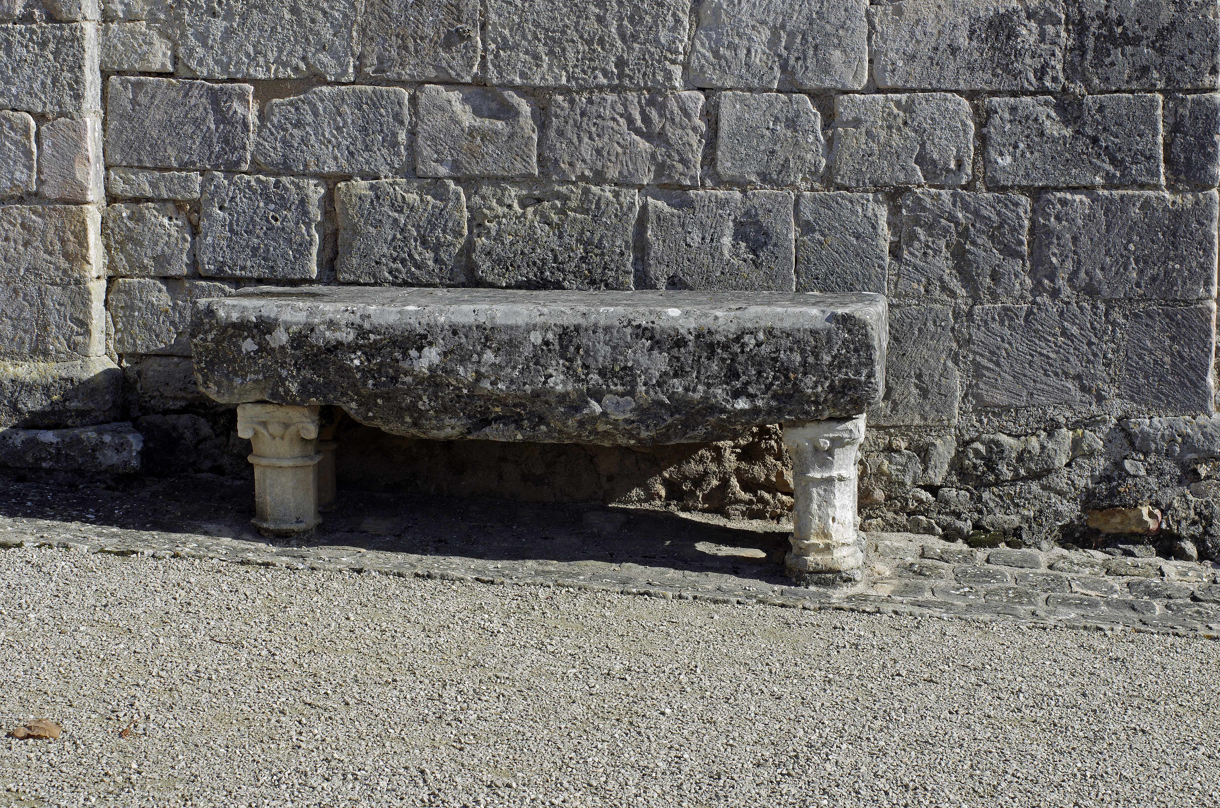 Antigny (Vienne) L’Eglise Notre–Dame-de-l’Incarnation. L’église édifiée au XIe siècle sur une ancienne nécropole mérovingienne a été remaniée aux XVe et XVIIIe siècles. Notre-Dame apparaît pour la première fois dans un acte du pape Lucius III daté de 1184, comme dépendance de l'abbaye de Saint-Savin. Une chapelle, la chapelle sainte-Catherine, a été rajoutée sur le flanc sud de l'église, en 1421, par Renaud de Mauléon, seigneur de Bois-Morand. Cette chapelle a été prolongée vers l'ouest, par un porche construit au XVIIIe siècle. L'église a conservé sa façade romane avec une porte à trois voussures surmontée d’une petite baie. Sur le parvis, à droite de la porte, une dalle soutenue par des colonnettes gothiques remployées, la “pierre des morts”, sur laquelle on déposait le cercueil des défunts avant l'entrée dans l'église. A gauche de la porte, un bloc rocheux avec une cavité carrée; il pourrait s'agir d'un socle d'une croix disparue.